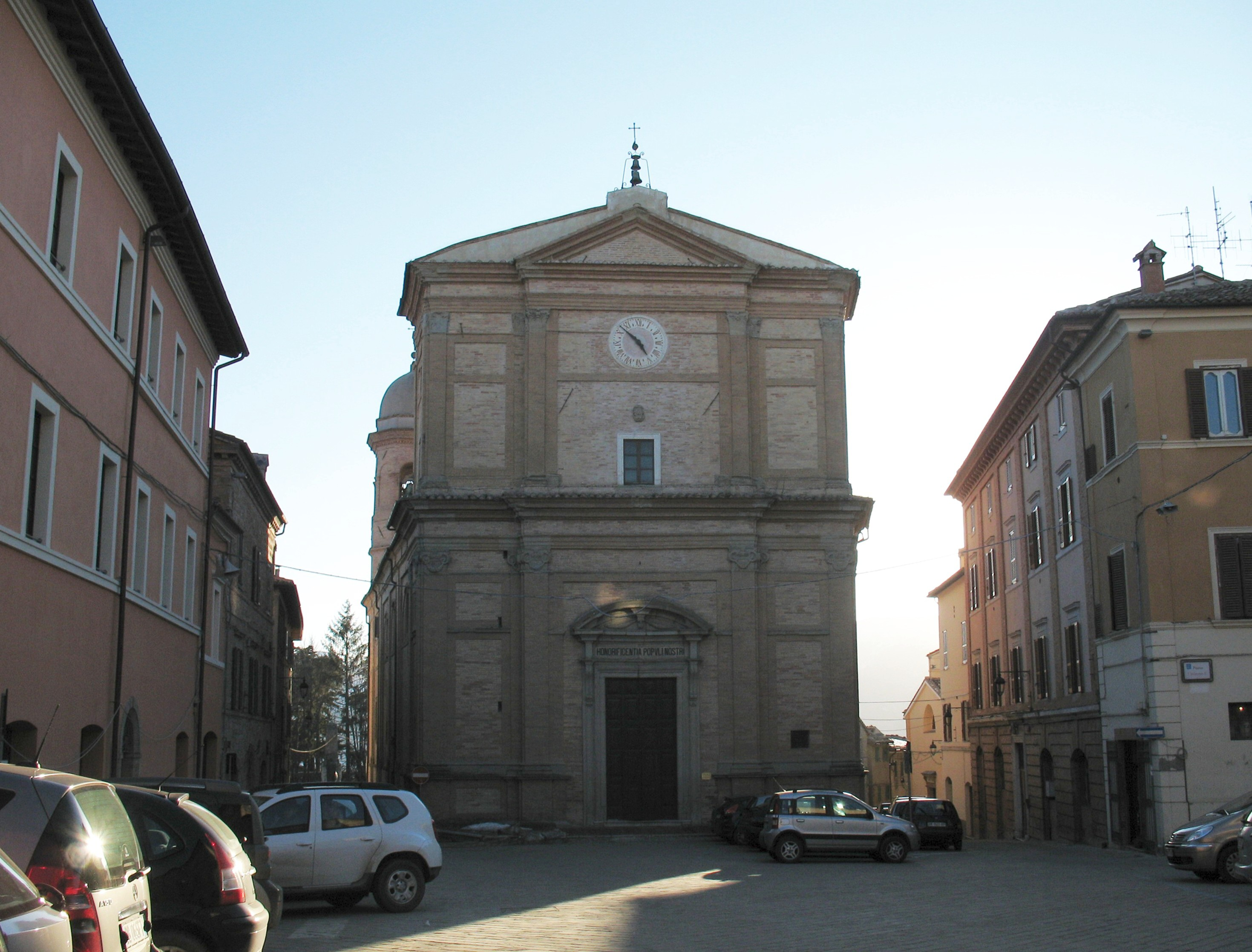 Kostel Santa Maria in Via